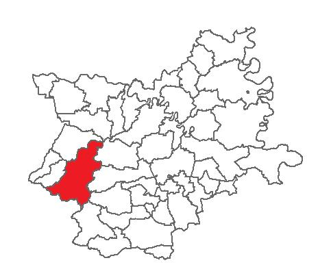 Područje Grada Našica na zemljovidu Osječko-baranjske županije